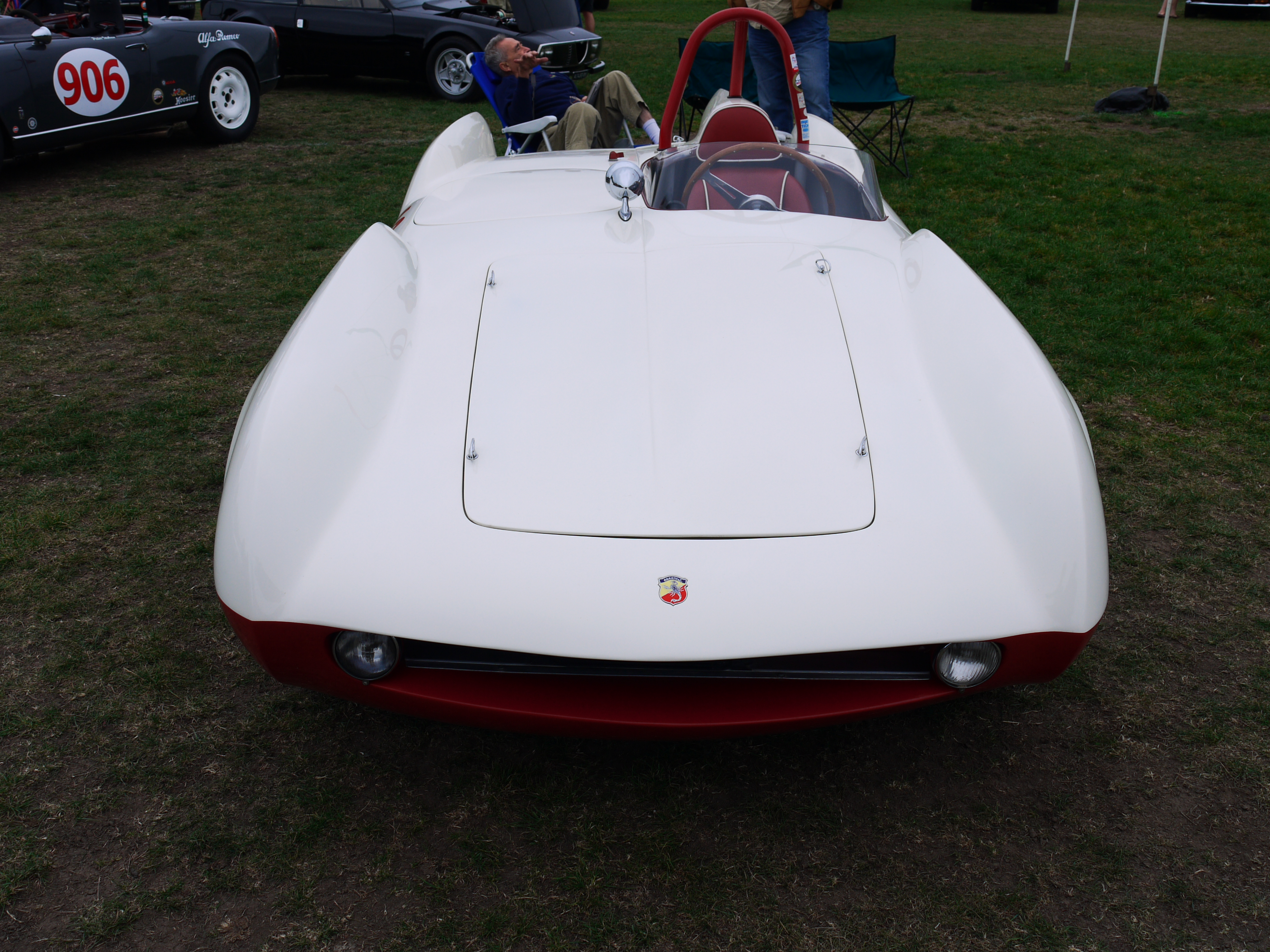 Abarth 207 A Boano Spider Corsa del 1955